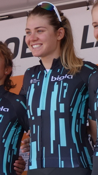 Martina Alzini (Bigla) bij de start van de eerste etappe van Stramproy naar Weert in de Boels Ladies Tour 2019